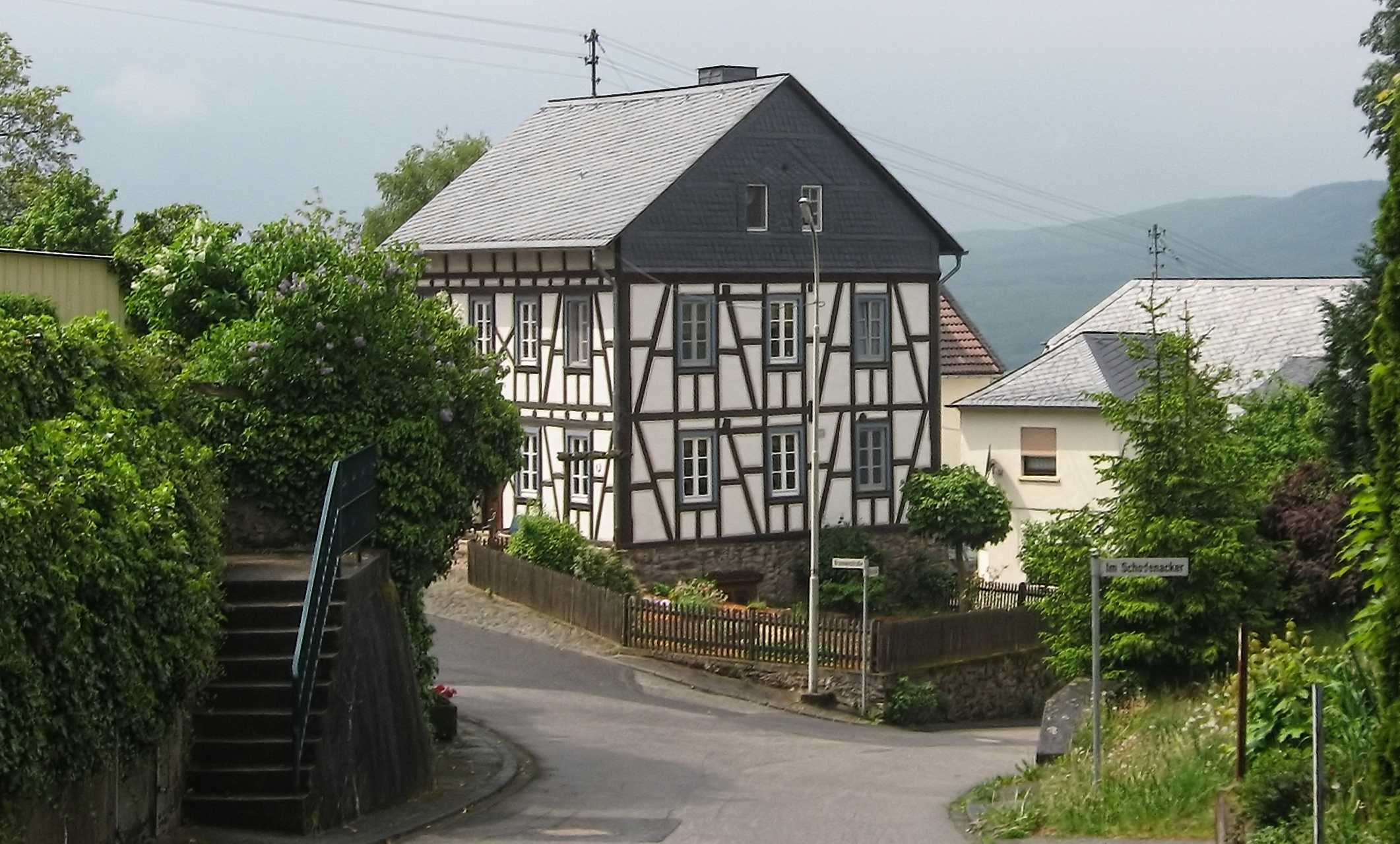 Village Schwarzerden in the Hunsrück landscape, Germany